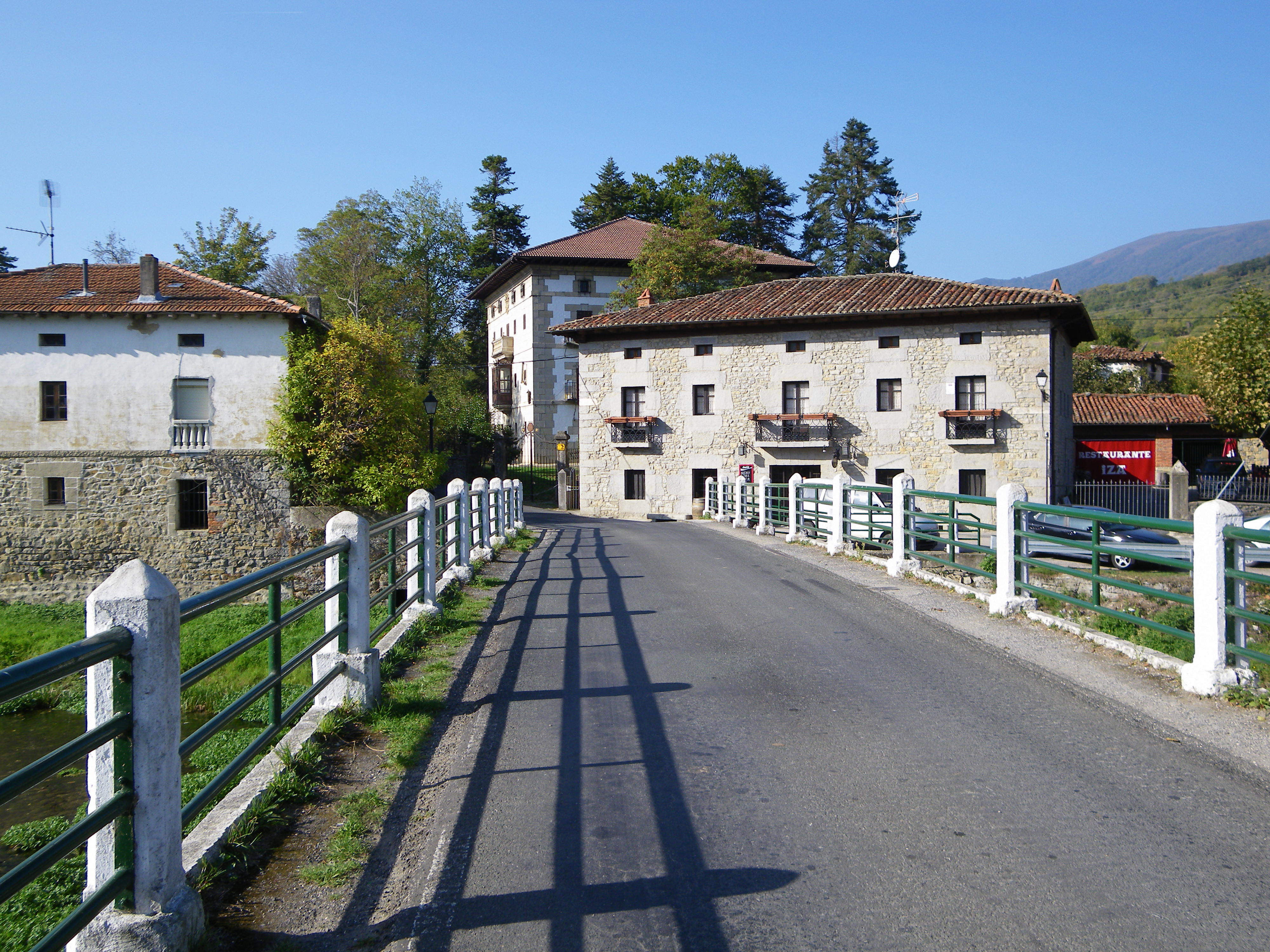 Nava de Ordunteko zubia Kadagua ibaiaren gainetik, Menako Harana (Burgos).